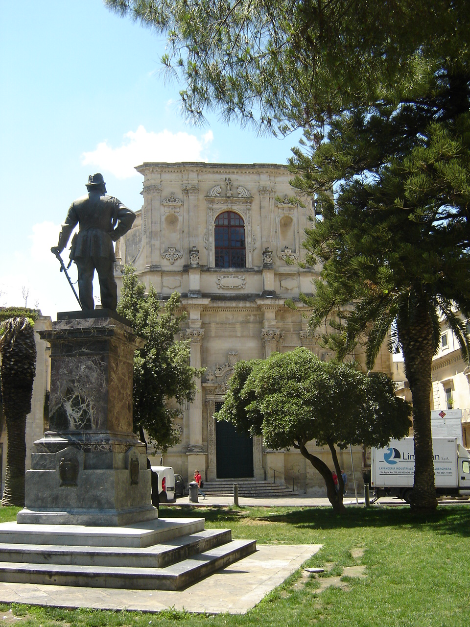 Lecce